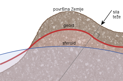 Geoid